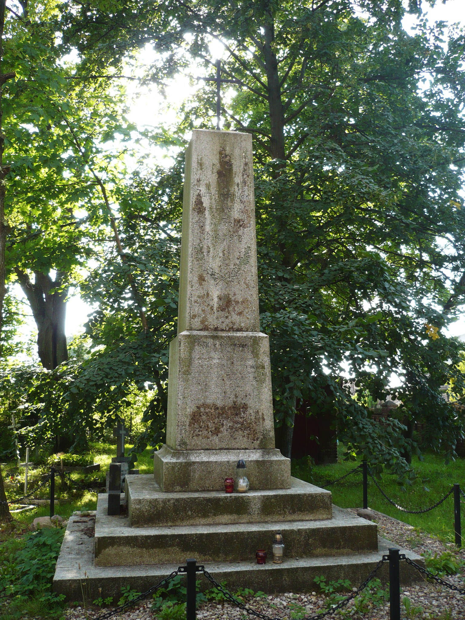 Korzystno, pomnik poległych w wojnie 1914-18